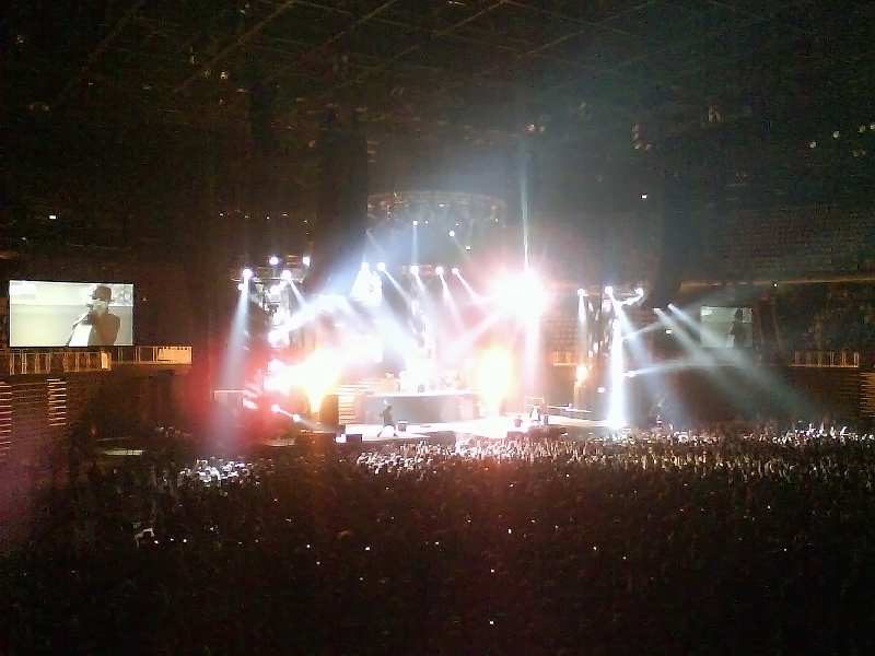 Guns N' Roses u Zagrebu